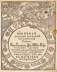 Гравюра титульного листа книги: Иоаникий (Галятовский). Небо новое с новыми звёздами. — Могилёв. — Типография Максима Вощанки, 1699. Из библиотеки Соловецкого монастыря. Поступила в АОКМ из Архангельского древлехранилища в 1920-е гг. АОКМ. КП 3525.